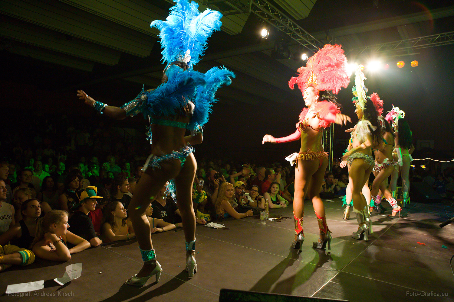 Samba Festival Coburg 2006 Tanzwettbewerb Finale